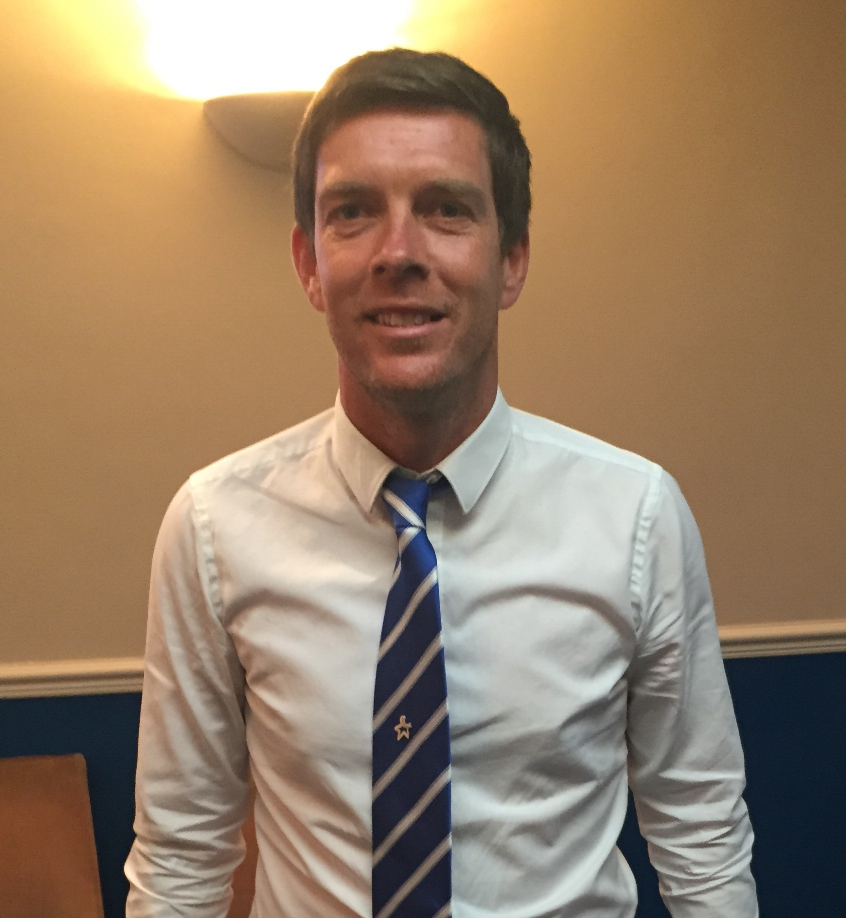 Walsall FC manager Darrell Clarke